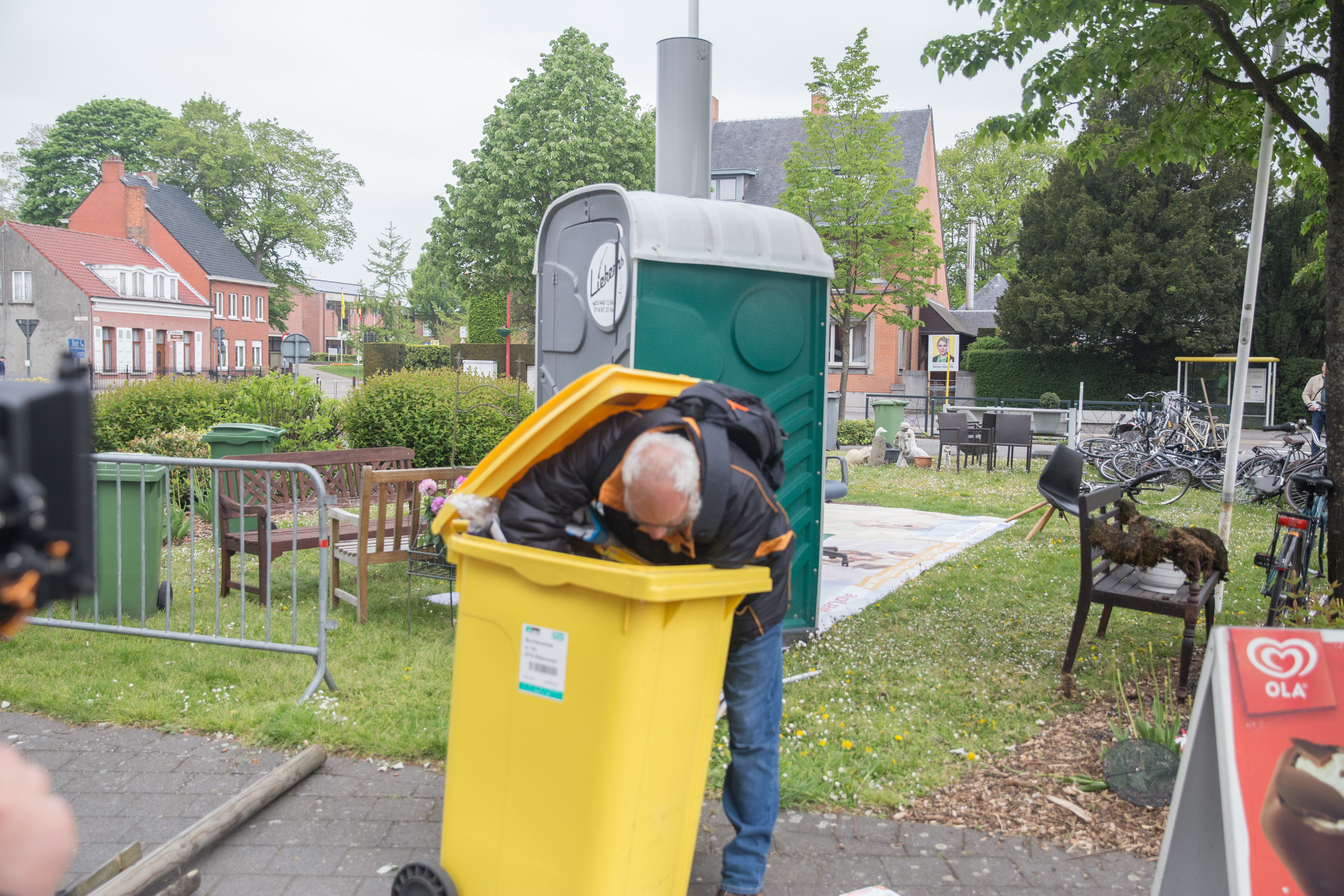 Een man doorzoekt een vuilnisbak in het centrum van Rijkevorsel ter gelegenheid van de lokale traditie Poortje Pik